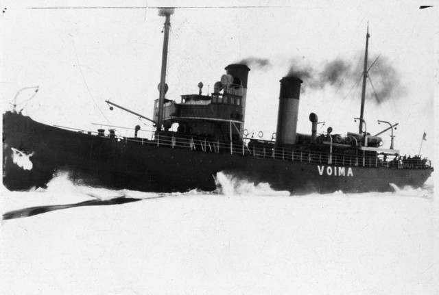 j/m Voima